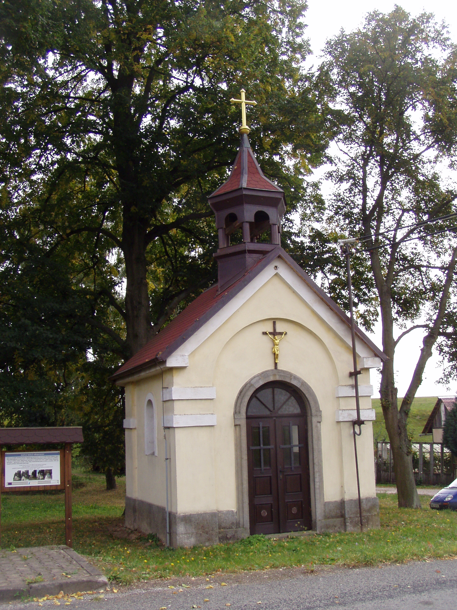 Kaple v Malých Hřibojedech